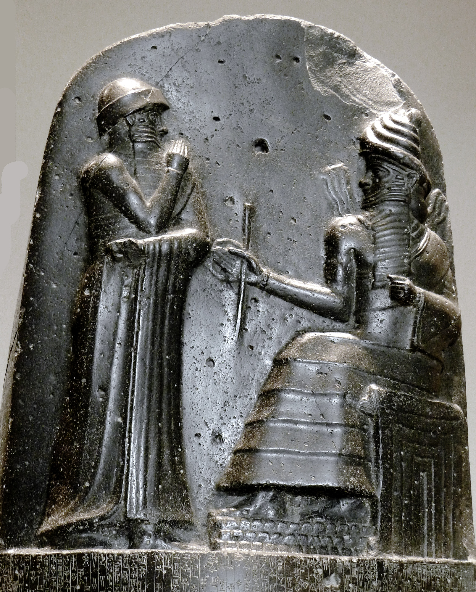 Code de Hammurabi, roi de Babylone ; face avant, bas-relief.